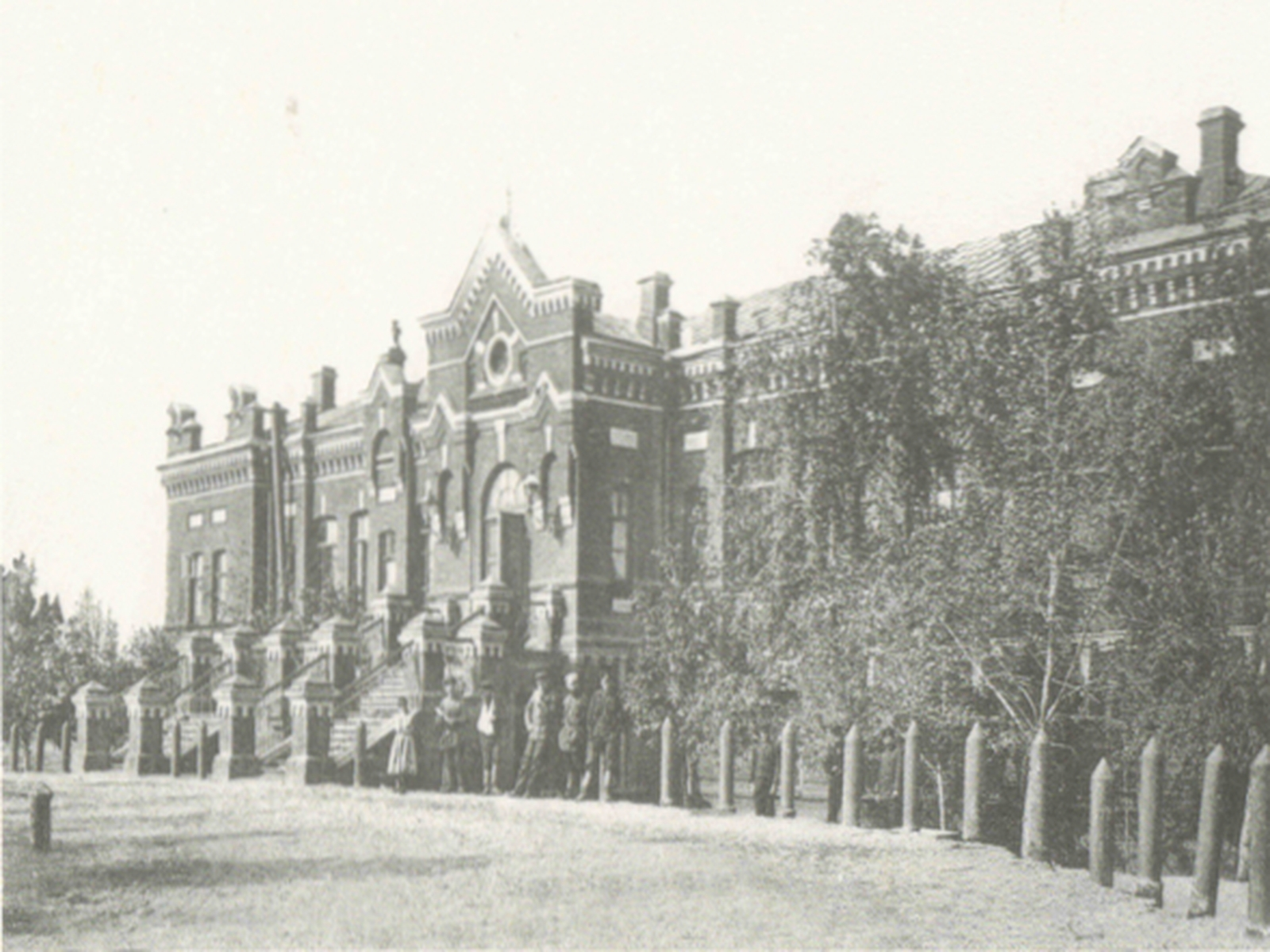 Железнодорожный вокзал г. Камышина в конце XIX века